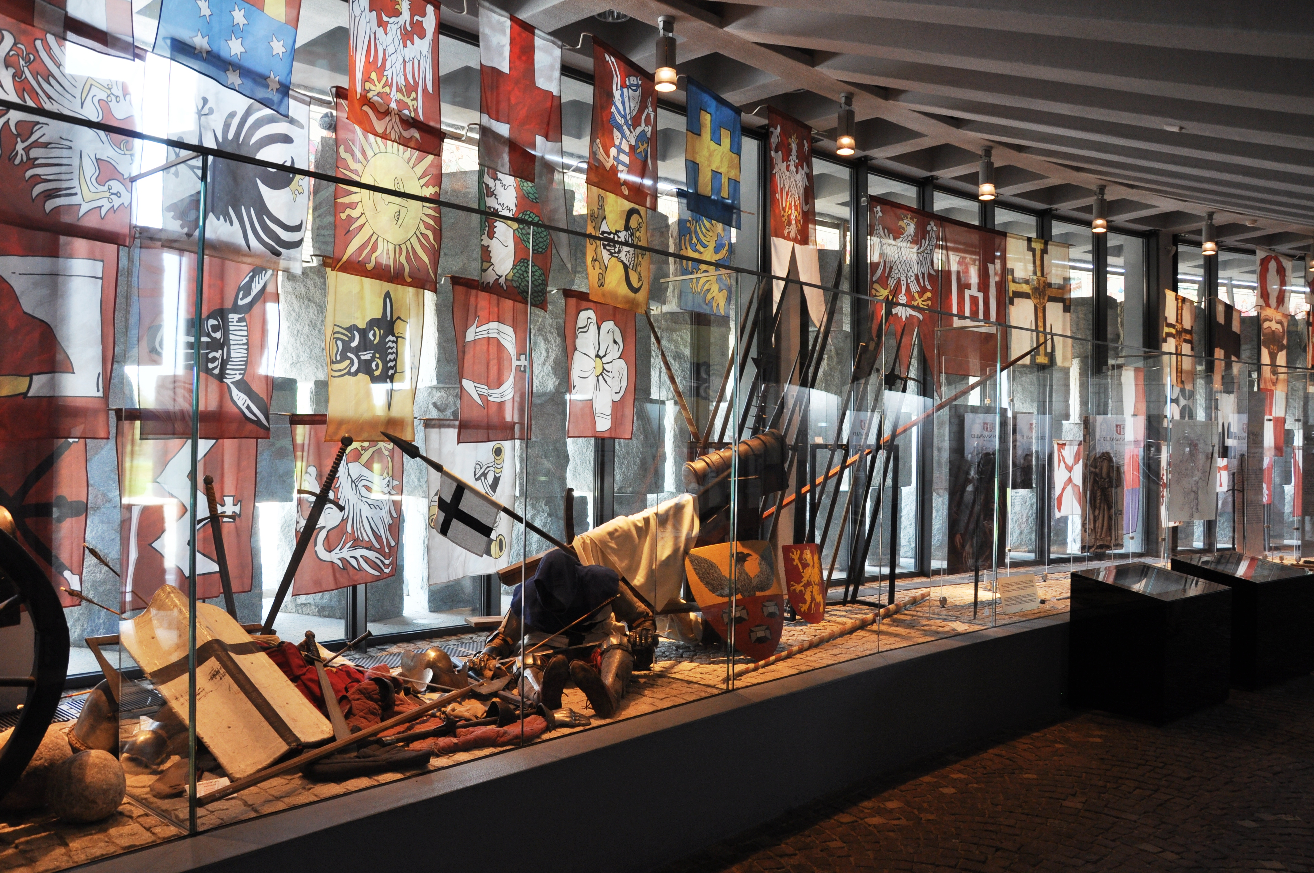 Musée de Grunwald, en 2015